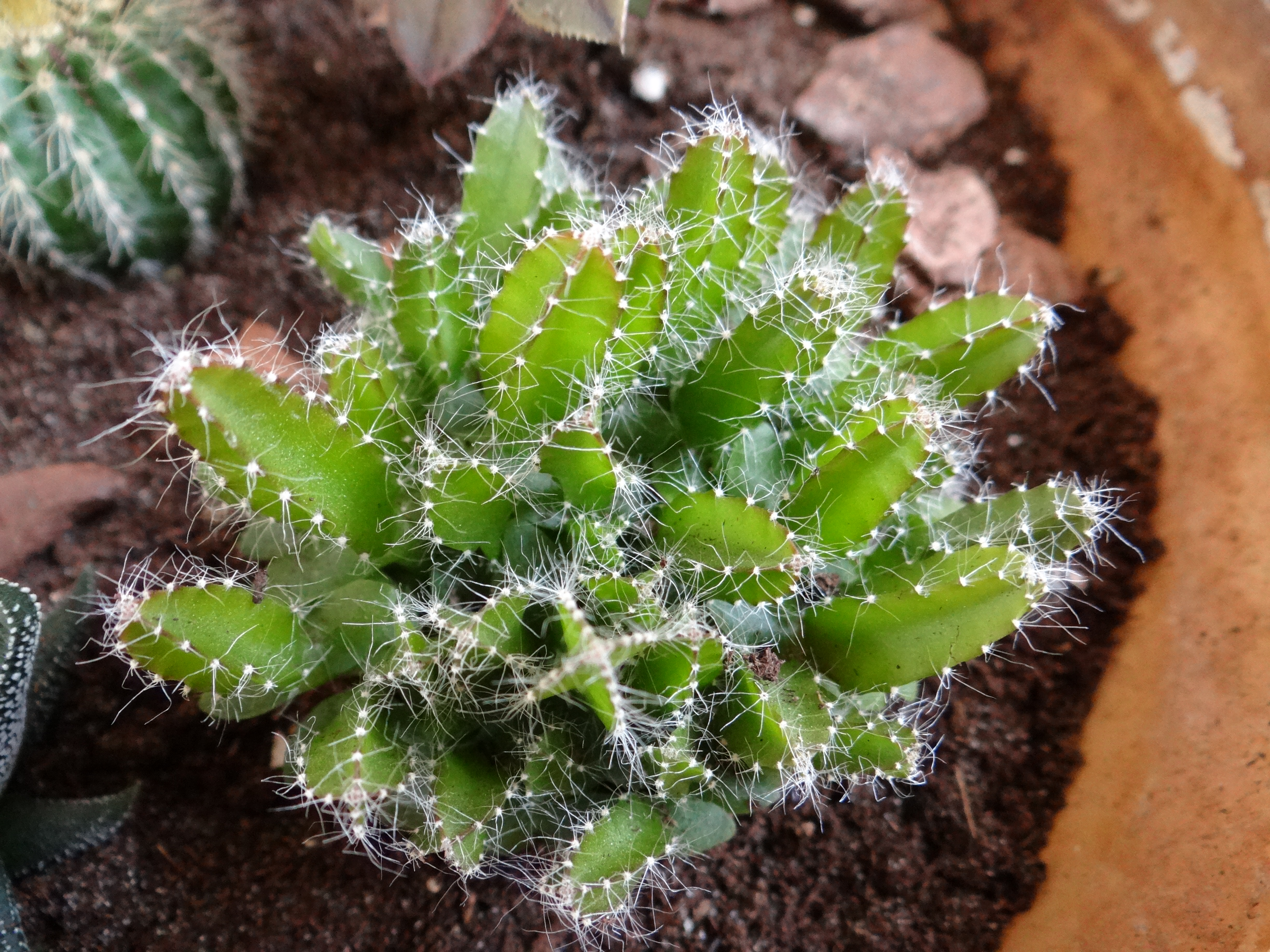 Jeune Hylocereus undatus (6 cm de large) dans une composition végétale.